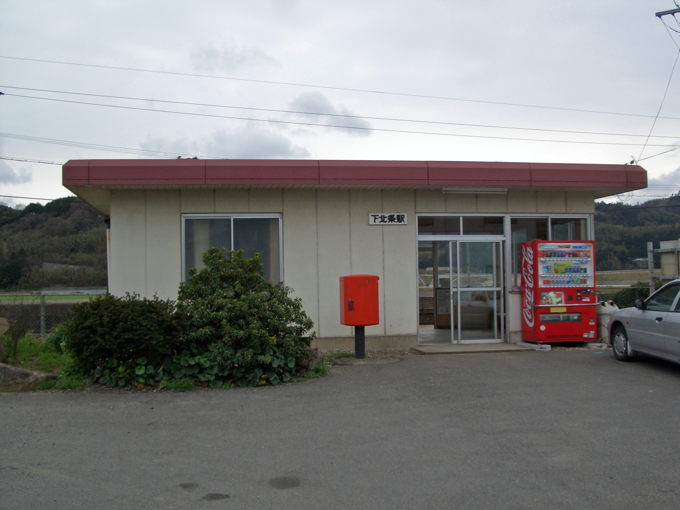 山陰本線下北条駅